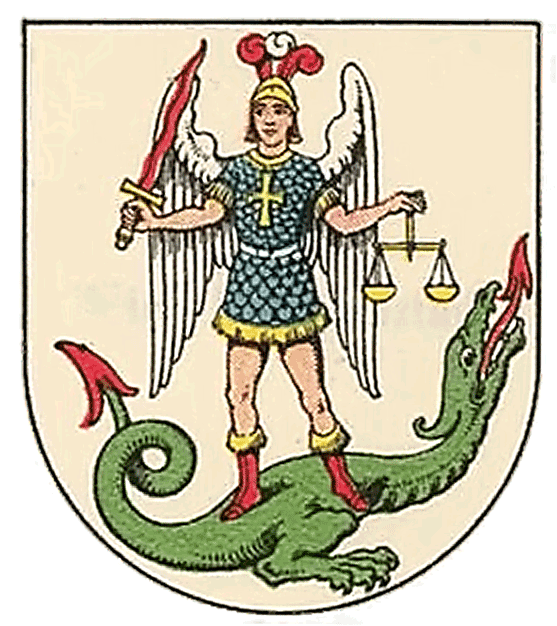 Wappen von Heiligenstadt (bis 1892 eine eigenständige Gemeinde und heute ein Stadtteil Wiens im 19. Wiener Gemeindebezirk Döbling): Sankt Michael mit Flammenschwert und Waage steht auf dem Drachen.